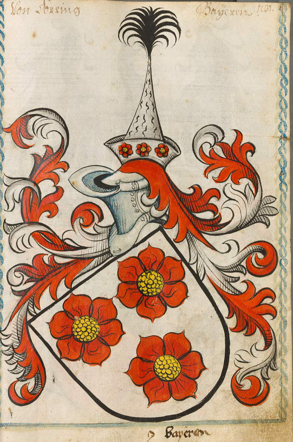 Scheibler'sches Wappenbuch, älterer Teil; Seite 181 Von Dörring Bayern